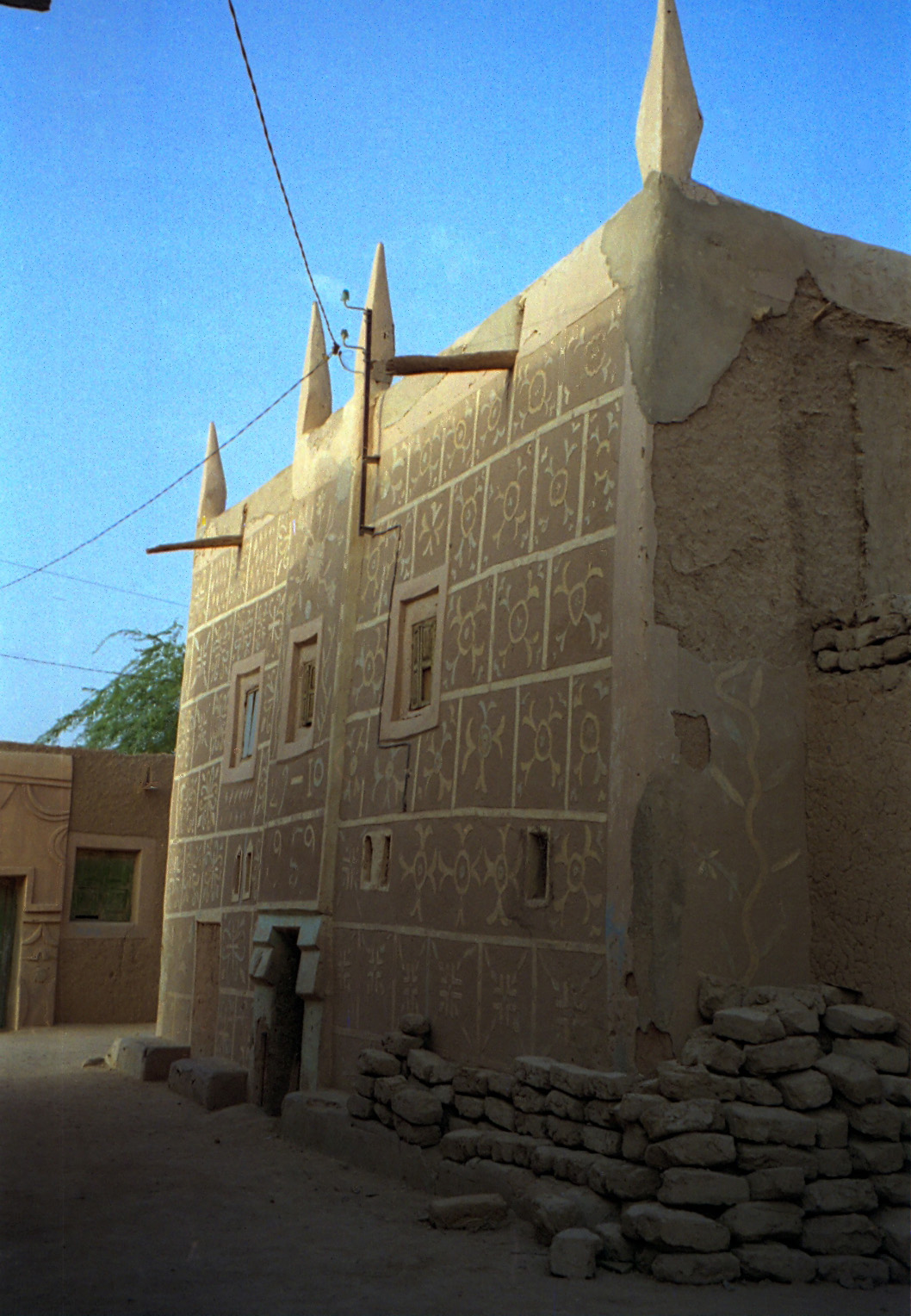 Agadez building.